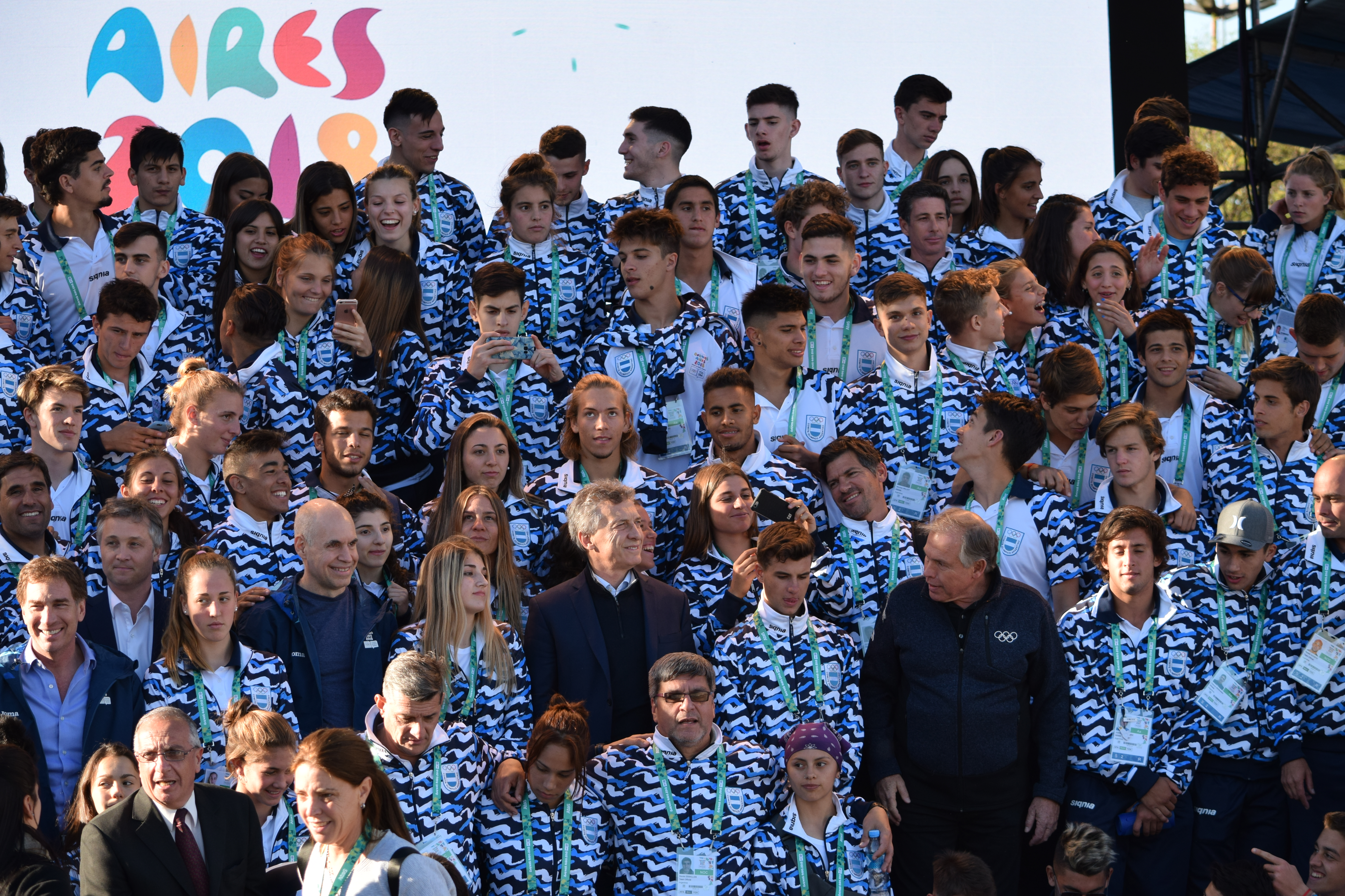 Bienvenida a la Delegación Argentina, en la Villa Olímpica por autoridades nacionales y locales.